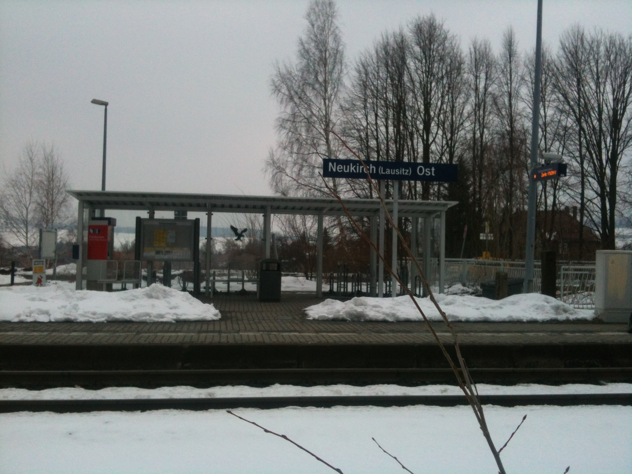 Der Haltepunkt Neukirch Ost